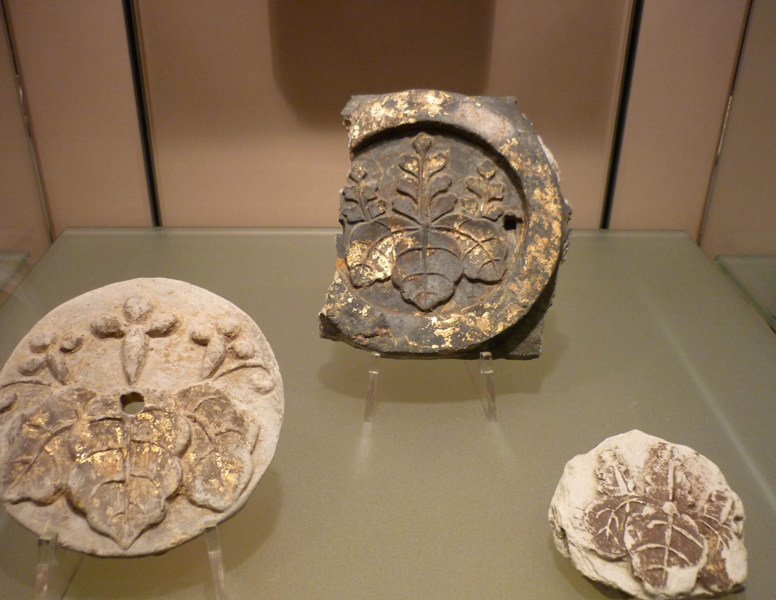 桐文金箔垂木先瓦（左）、桐文金箔道具瓦（中央）、桐文金箔道具瓦（右）